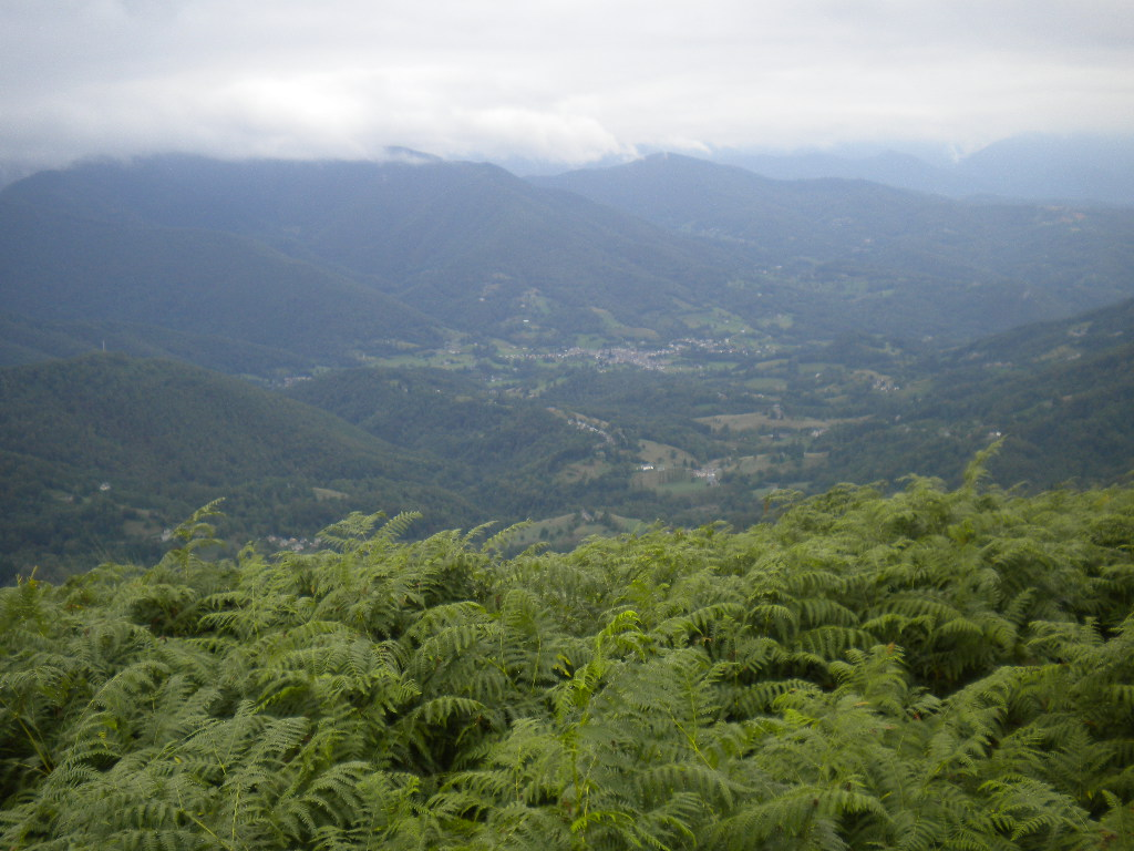 Vue du Massatois (Couserans, Ariège, France).